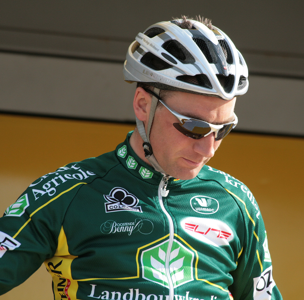 Bert De Waele voor de start van Luik-Bastenaken-Luik 2008